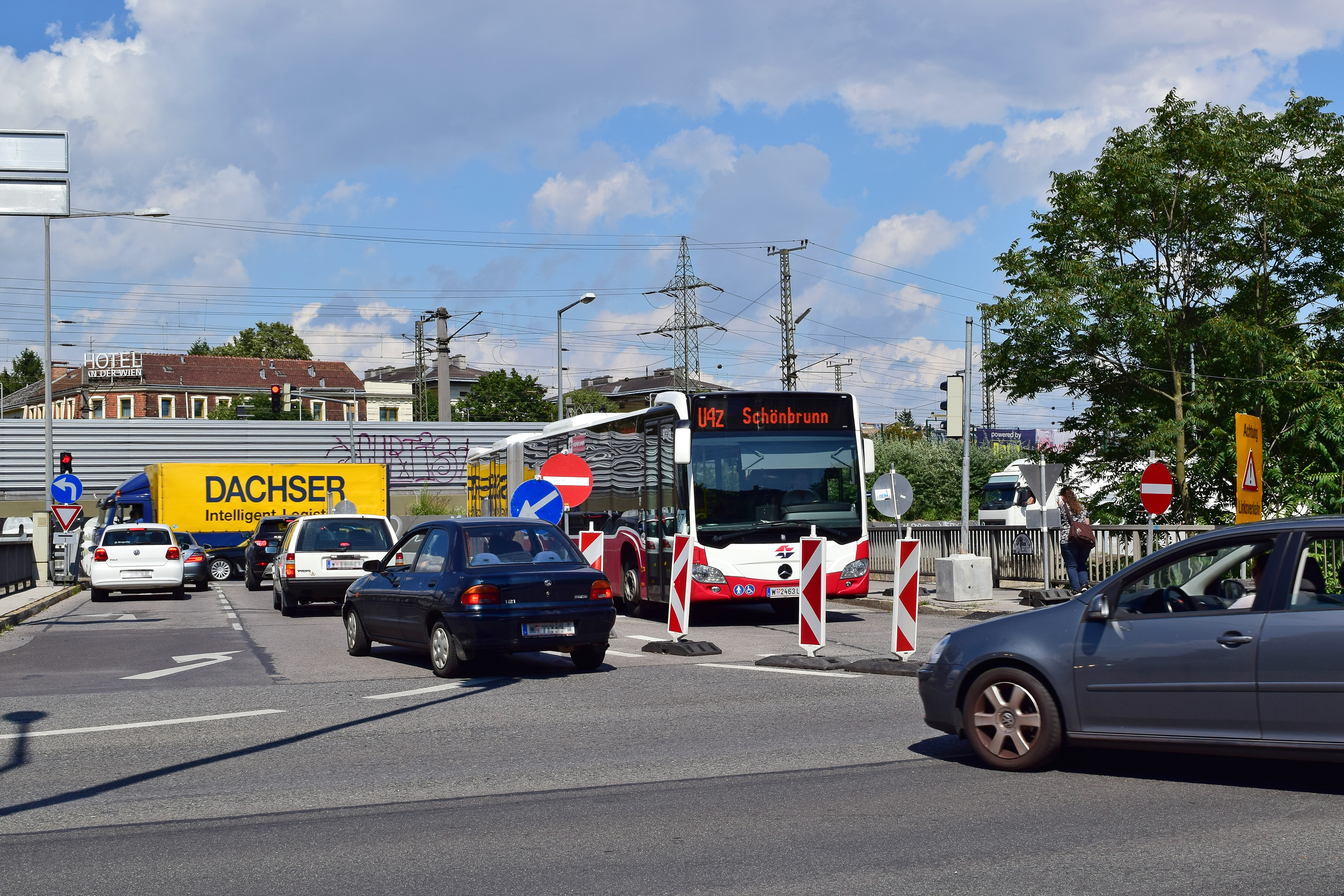 Während der Modernisierung der U4 ("ReNEUvierung") wurde der Verkehr auf der Hütteldorfer Brücke von 12. April bis Anfang September 2016 auf Linksverkehr umgestellt.[1]